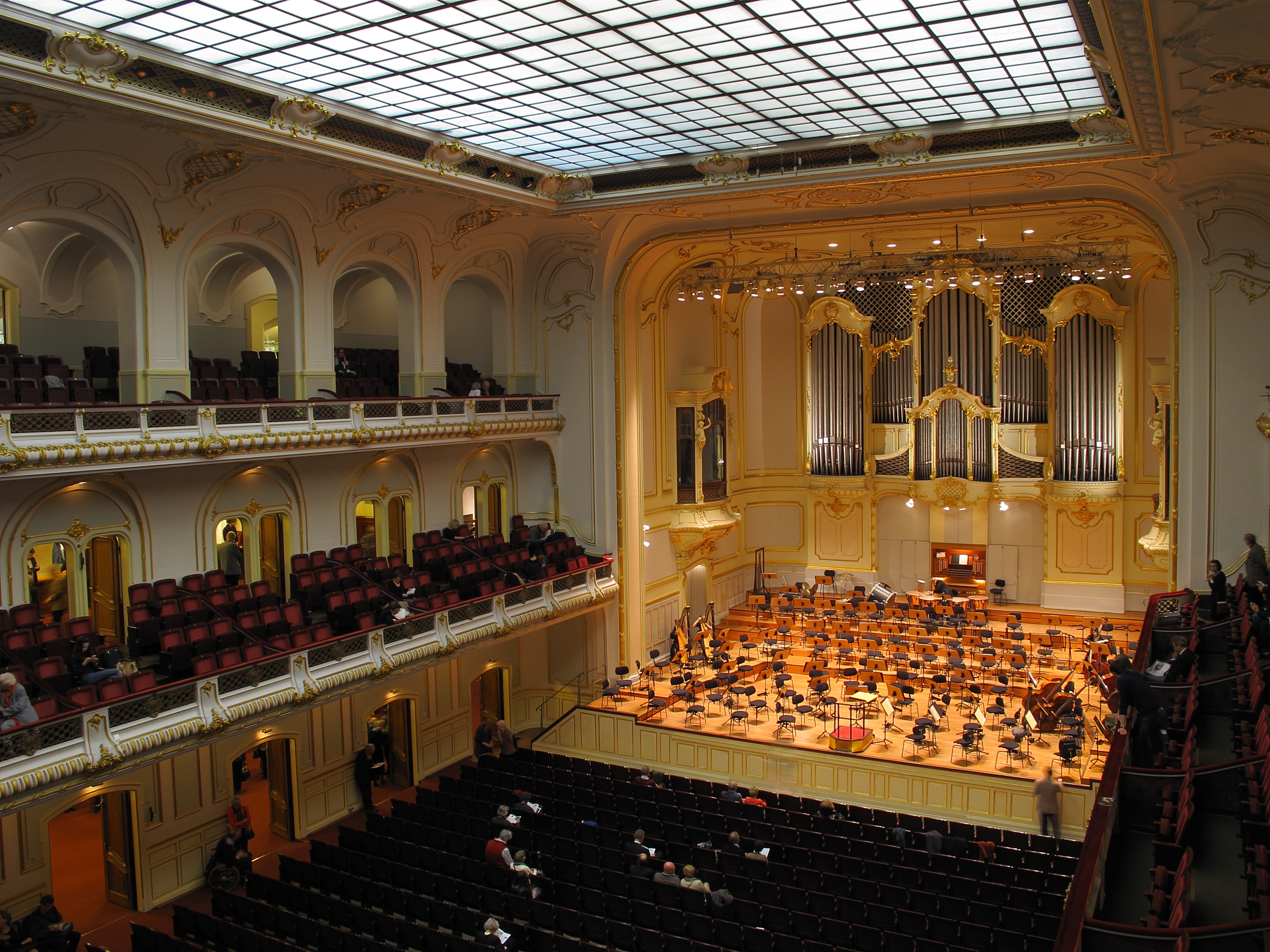 Bühne des Großen Saals der Laeiszhalle (Musikhalle) in Hamburg